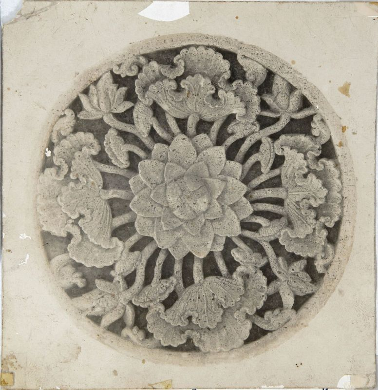 Tekening. Foto van een reliëf bij het graf van Kali Nyamat te Mantingan